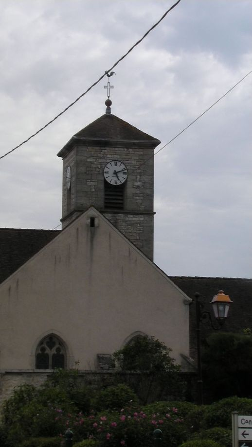 église de BELLENEUVE 21